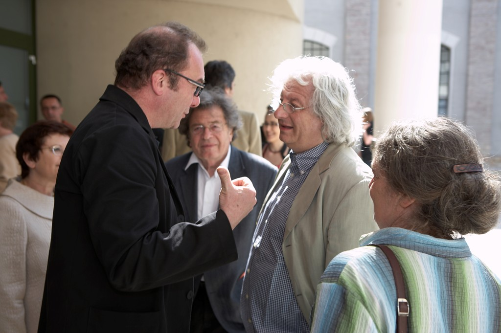 Robert Menasse, Konrád György és Esterházy Péter a Budapesti Nemzetközi Könyvfesztiválon